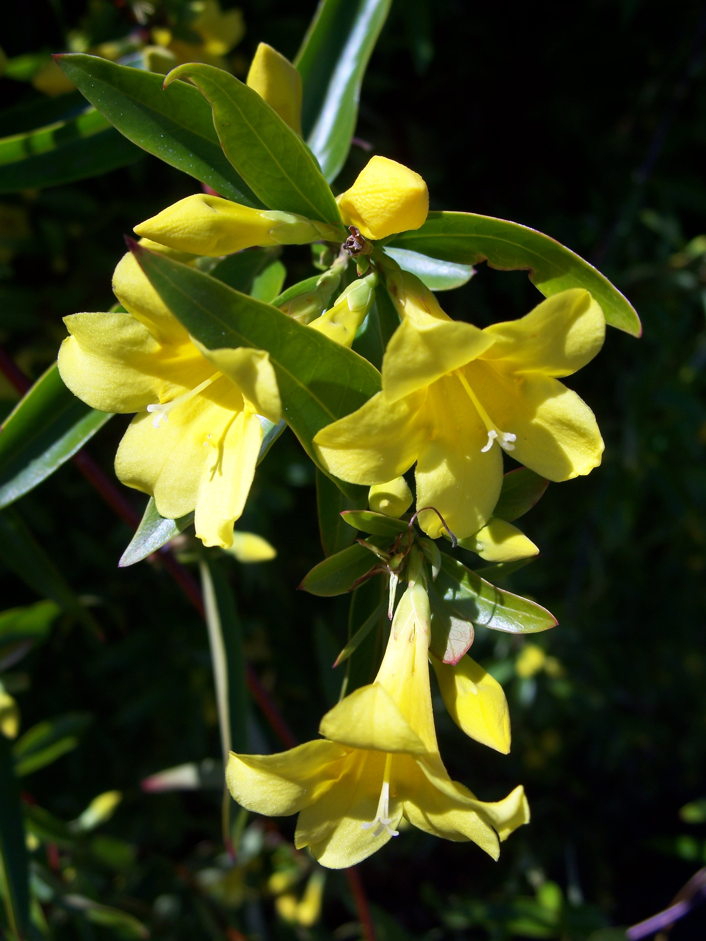 Gelsemium sempervirens Made in San Jose, California on February 17, 2007. Identified by Franz Xaver.